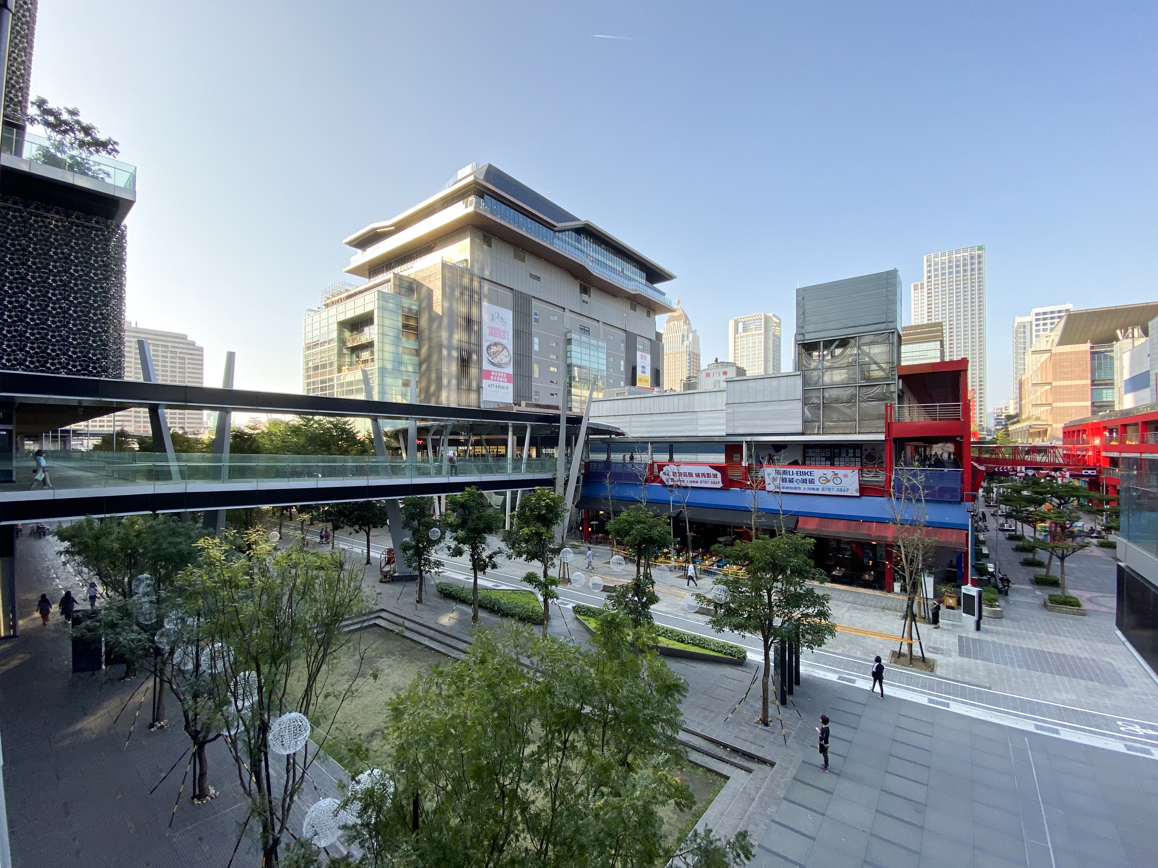 信義連通天橋